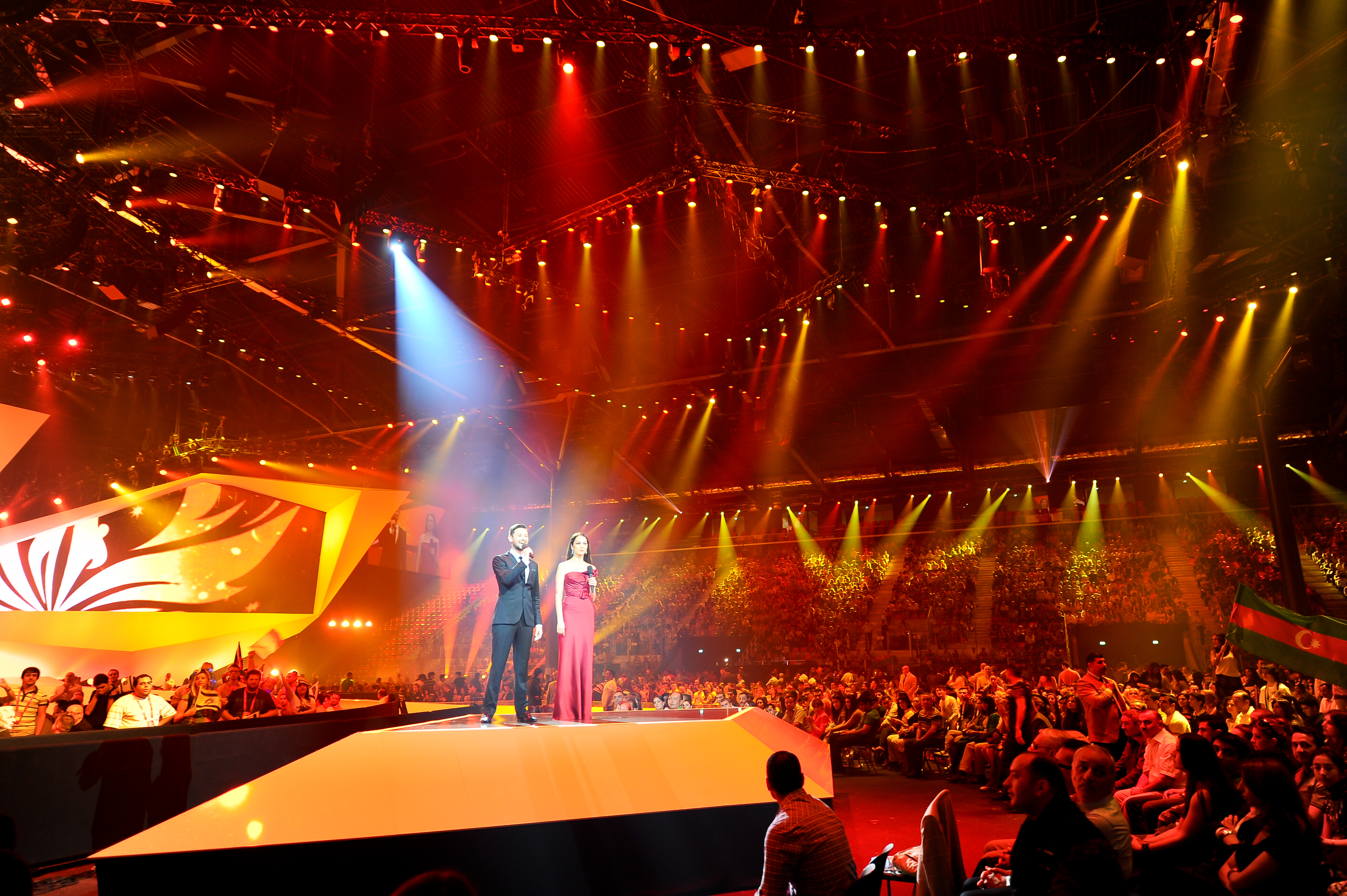 Сцена Baku Crystal Hall